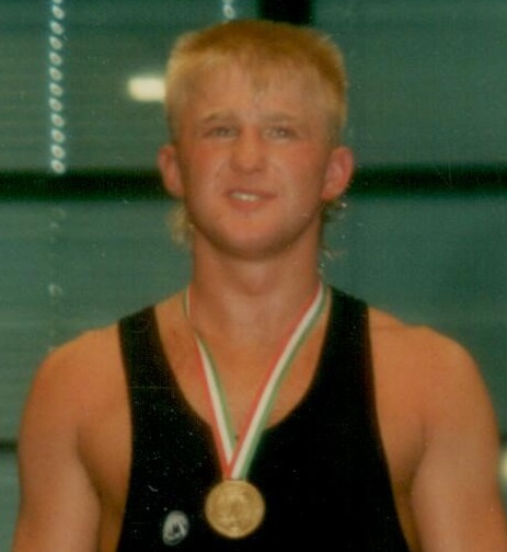 Markus Keusgen in Hochform